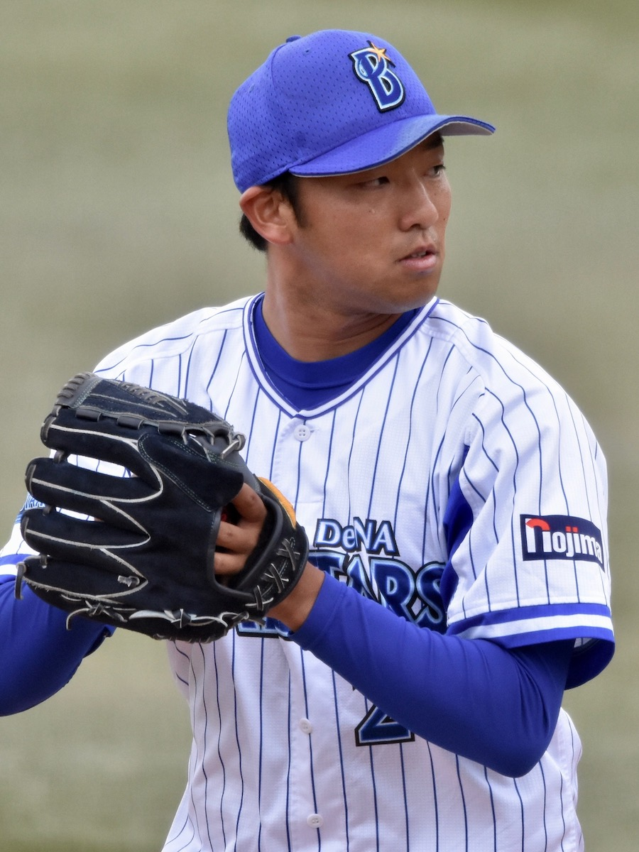 2019年5月18日、大和スタジアムにて